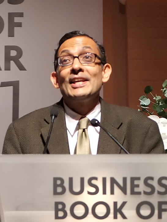 Mr Abhijit V. Banerjee, winning Author